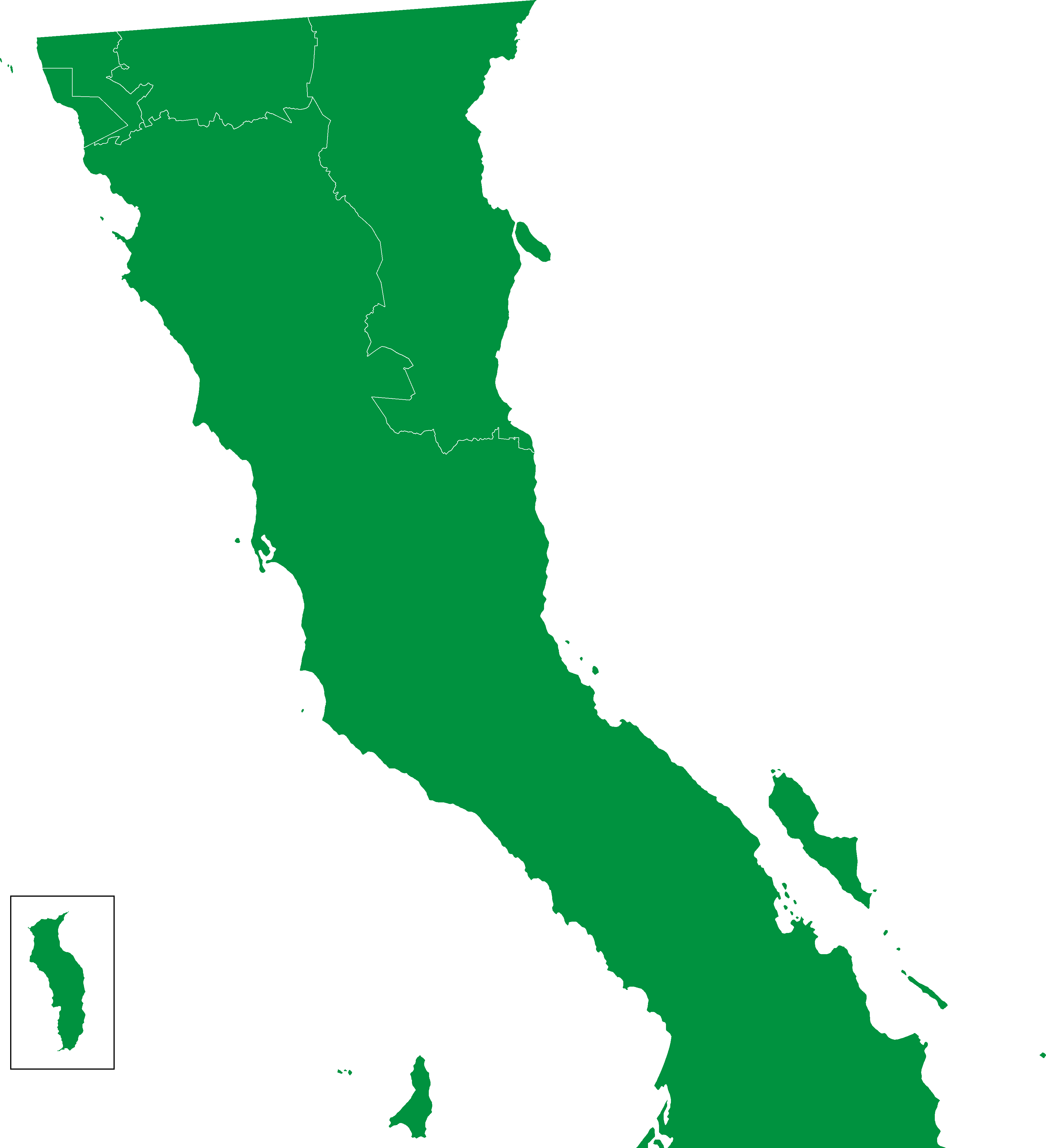 Resultados de la elección a Ayuntamientos por partido político en el estado de Baja California, México en 2010.